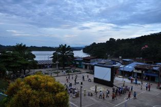 Cine itinerante realizado por la asociación Nomadas en zona rural del perú. Nomadas y la pantalla inflabe llegan a lugares del pais donde disfrutar del cine era una experiencia que hacia falta por vivir.